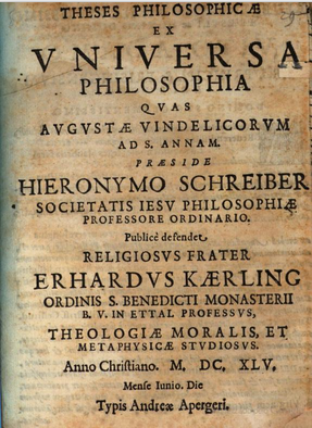 Theses philos. ex universa philosophia, 1645, Hieronymus Schreiber (1547), E. Kaerling